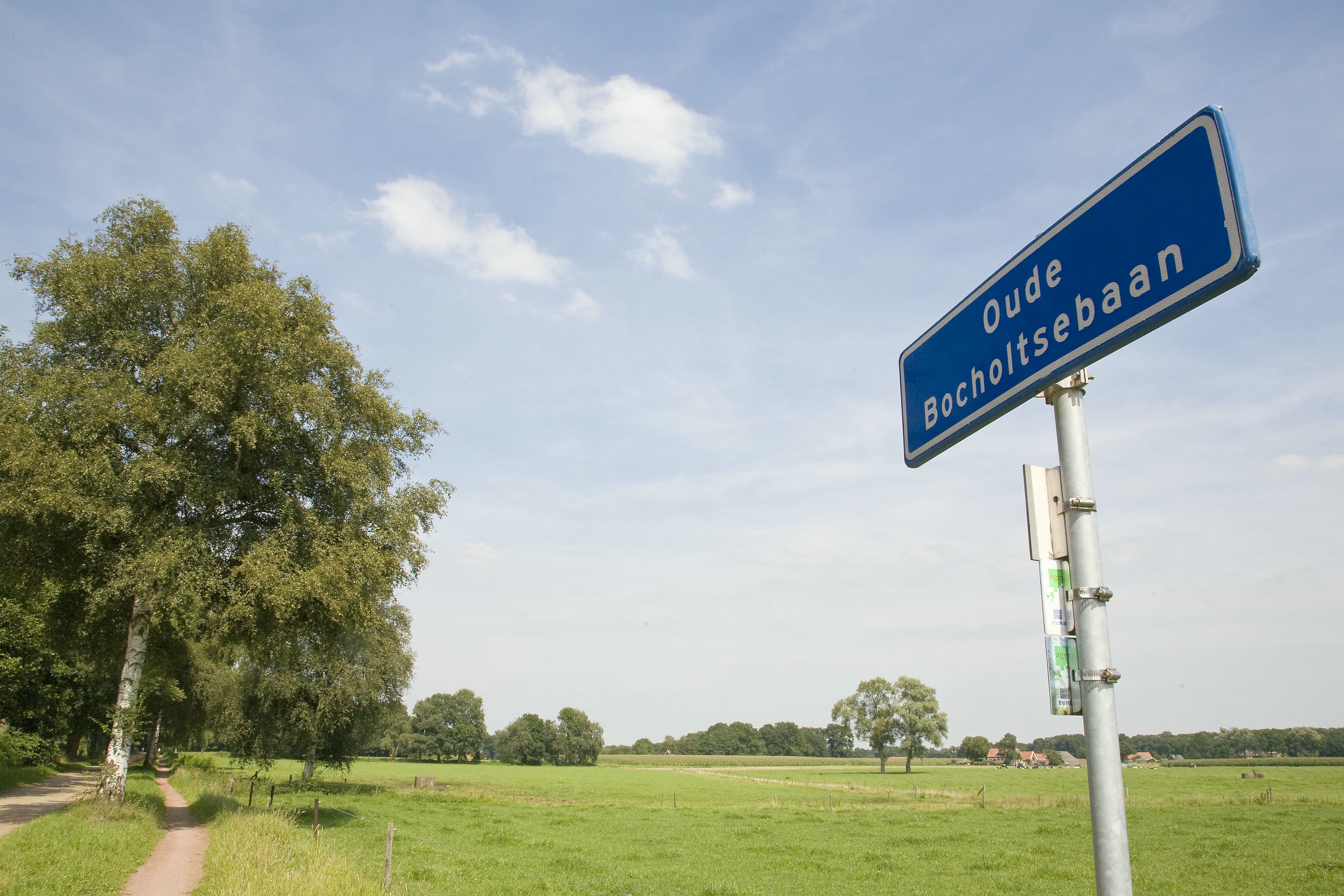 Straatnaambord: Overzicht landschap met op de voorgrond een straatnaambord (opmerking: Publicatie: TRAP Winterswijk (Cultuurhistorische Routes in Nederland - 60))